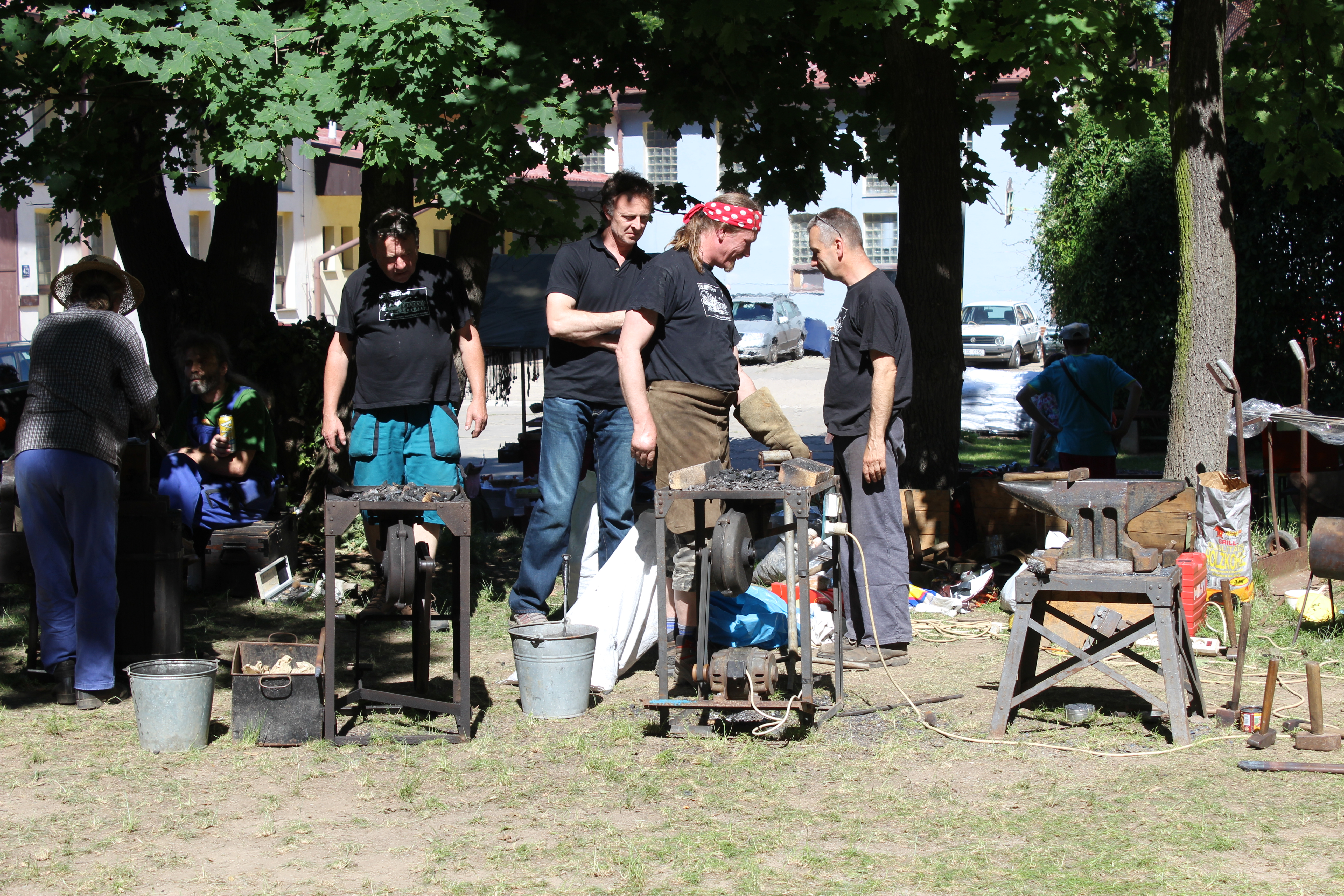 V Litni (okres Beroun) se o víkendu 7. a 8. 6. 2014 konalo 1. setkání kovářů, podkovářů, dráteníků, klempířů a všech, kteří pracují s kovem s názvem „Kováři v Litni“. Příští „Kováři v Litni“ se konají 6. – 7. 6. 2015 opět v Areálu Liteň a budou spojeni se setkáním absolventů škol, které zde působily: Středního odborného učiliště a Učňovské školy zemědělské, obor kovář – podkovář. Pořadateli jsou Atelier Svatopluk, o.p.s. Liteň a Kovárna pro radost v Kytíně.